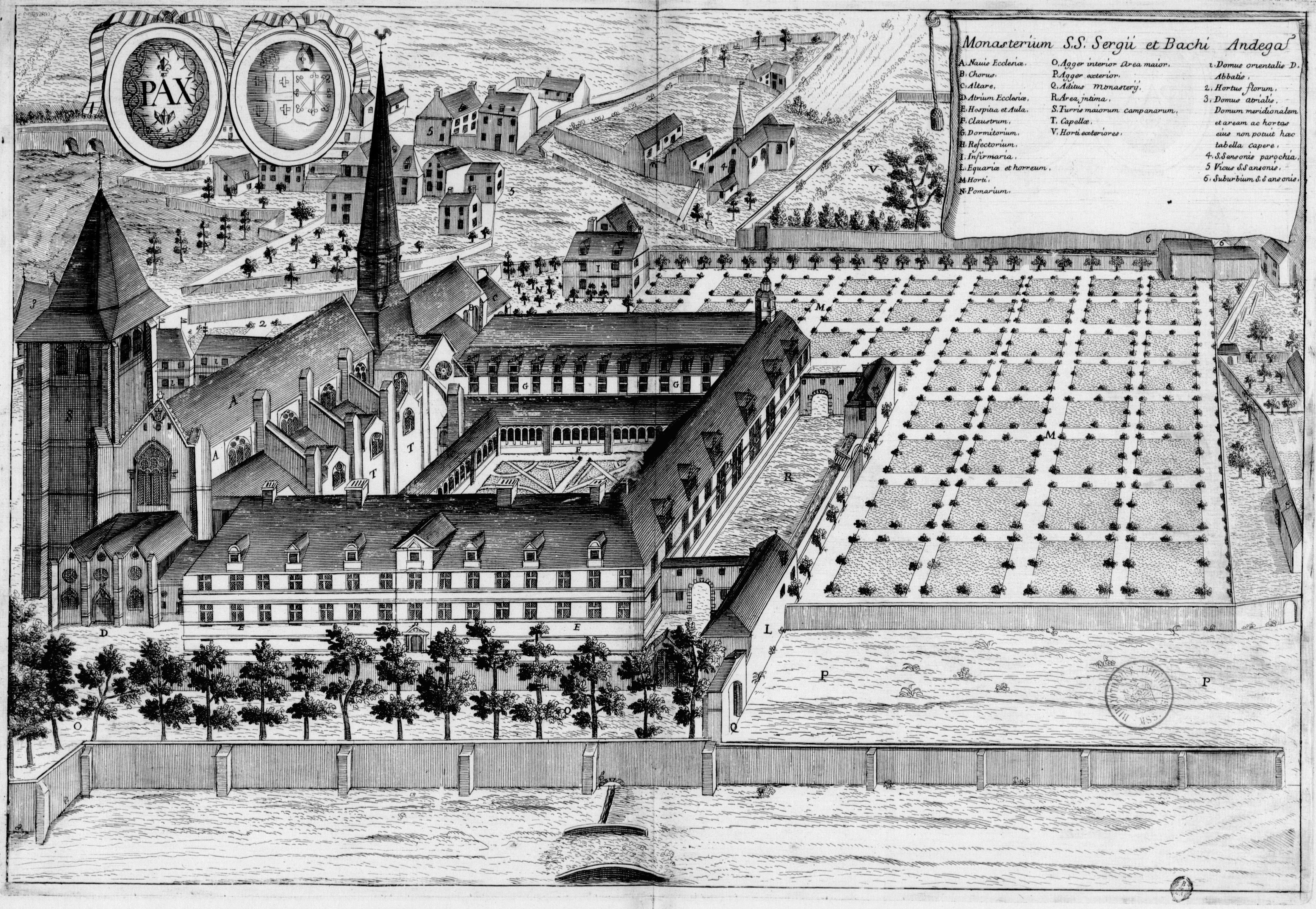 Planche gravée du 17ème siècle représentant l'abbaye Saint-Serge d'Angers, dans le livre Monasticon Gallicanum.